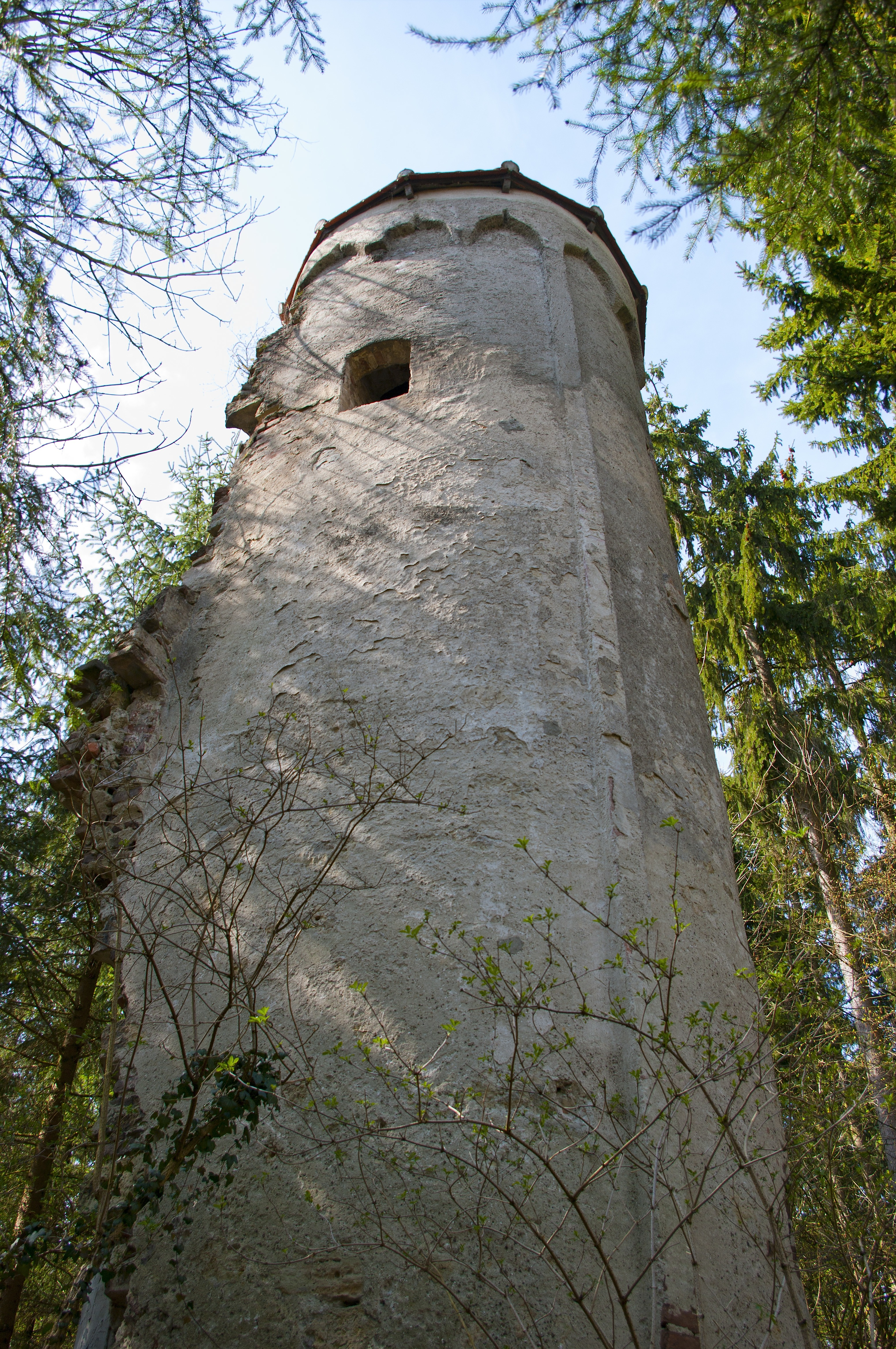 Erbaut zu Beginn des 14. Jahrhunderts, niedergebrannt 1756. Nur dieser Turm, der sogenannte „Römerturm“, ist noch erhalten.